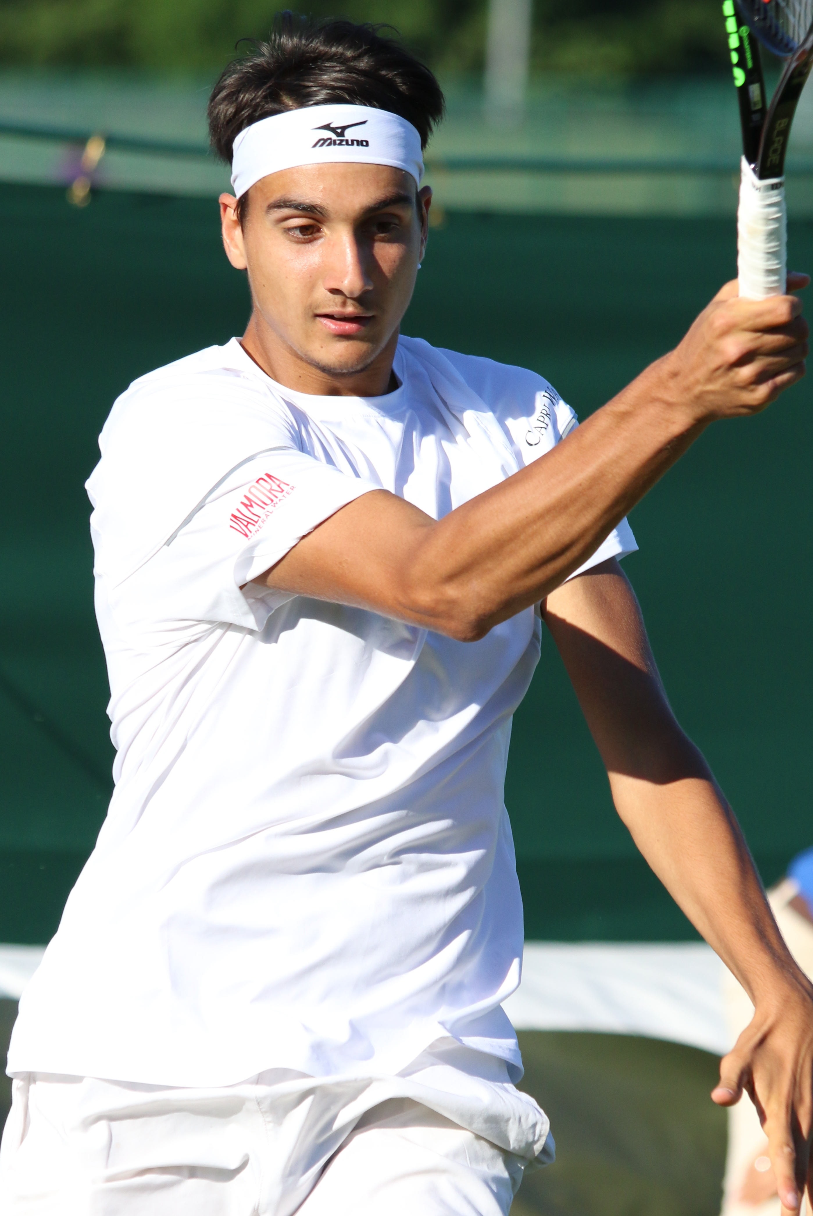 Sonego WMQ18 (11)